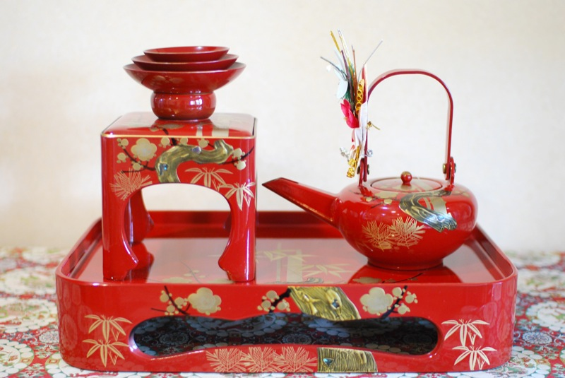 "Otoso" 屠蘇 spiced sake